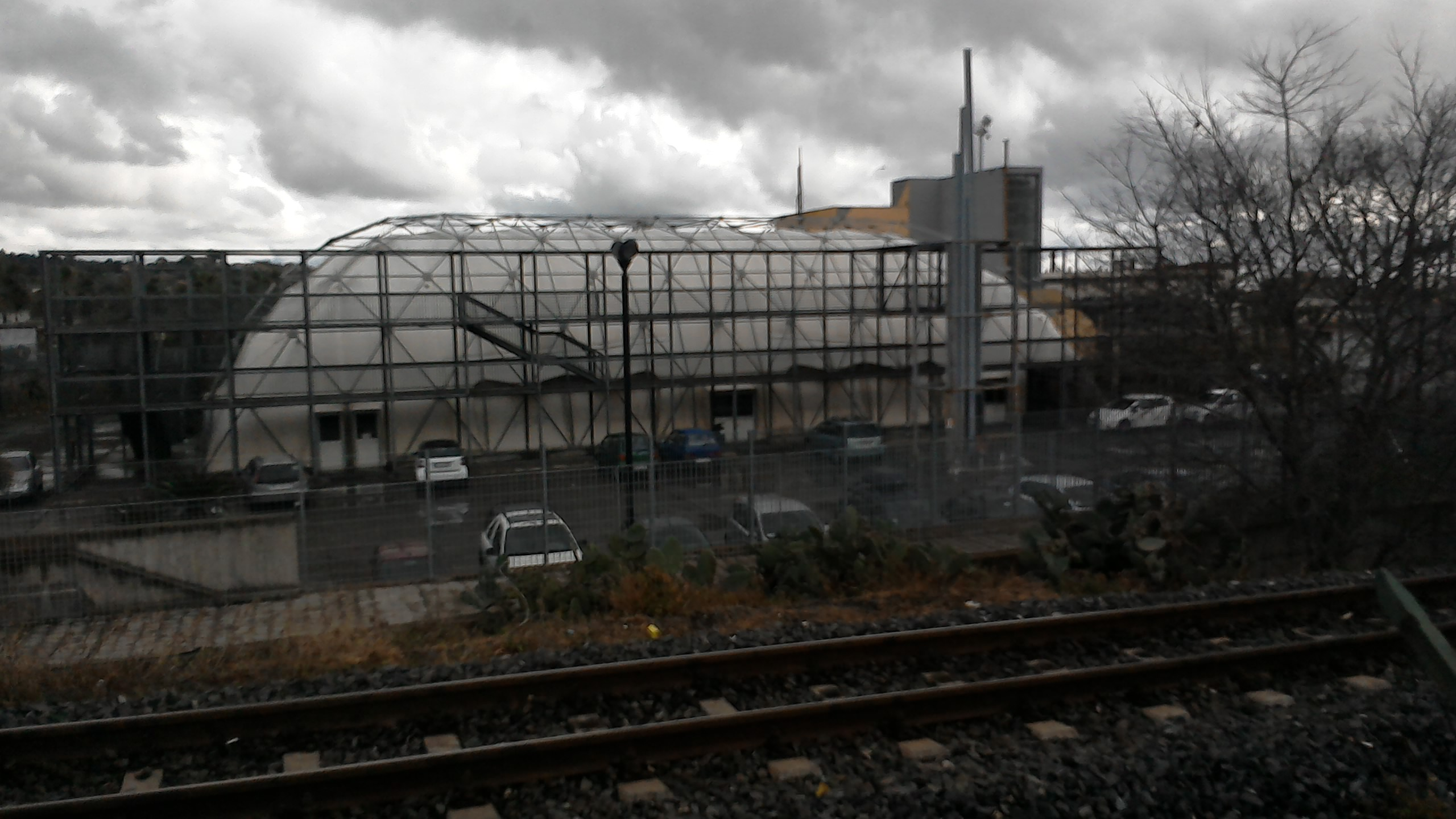 Palatenda - Misterbianco